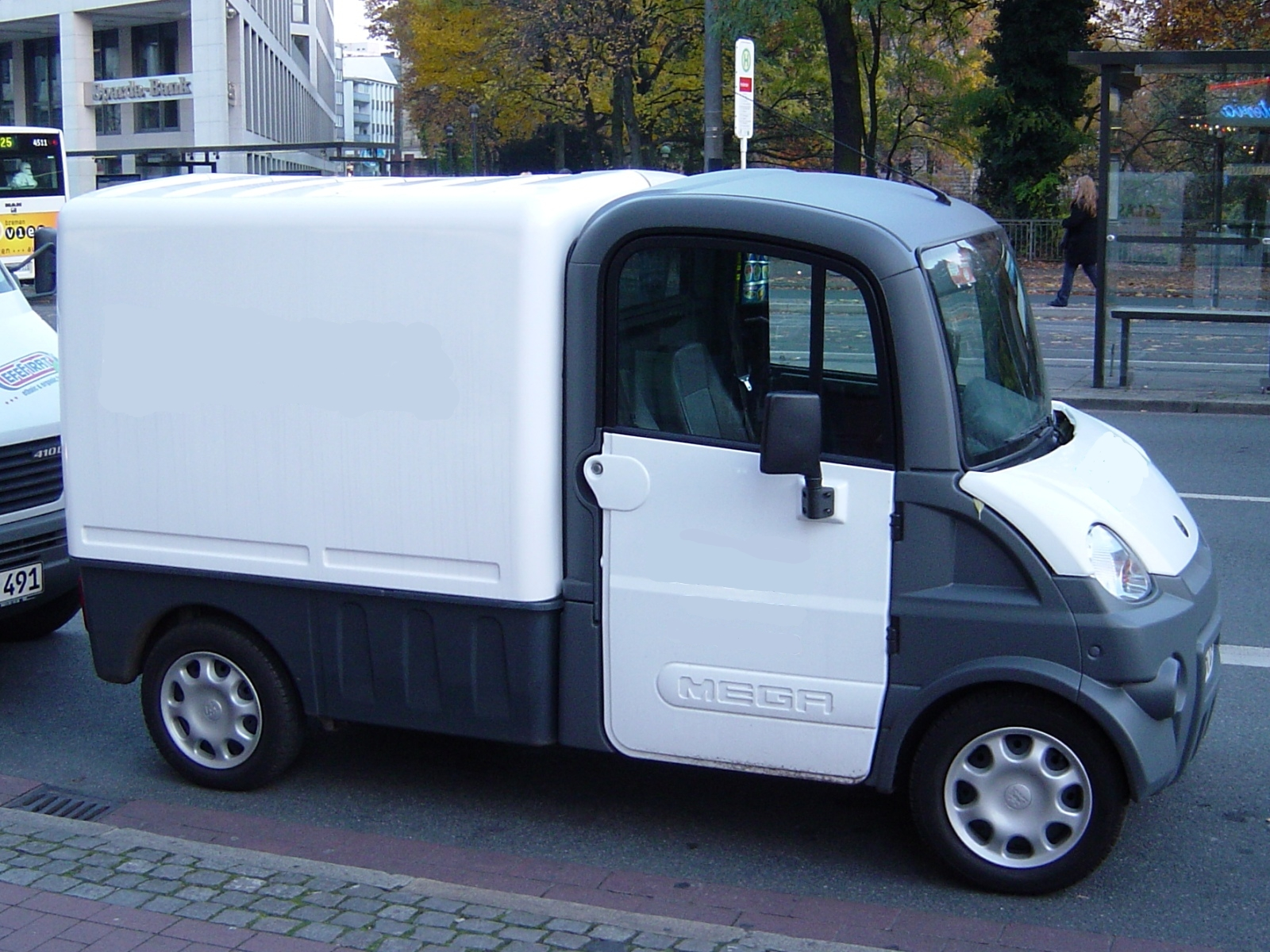 Überarbeitete (anonymisierte) Version der File:Mega MultiTruck.jpg